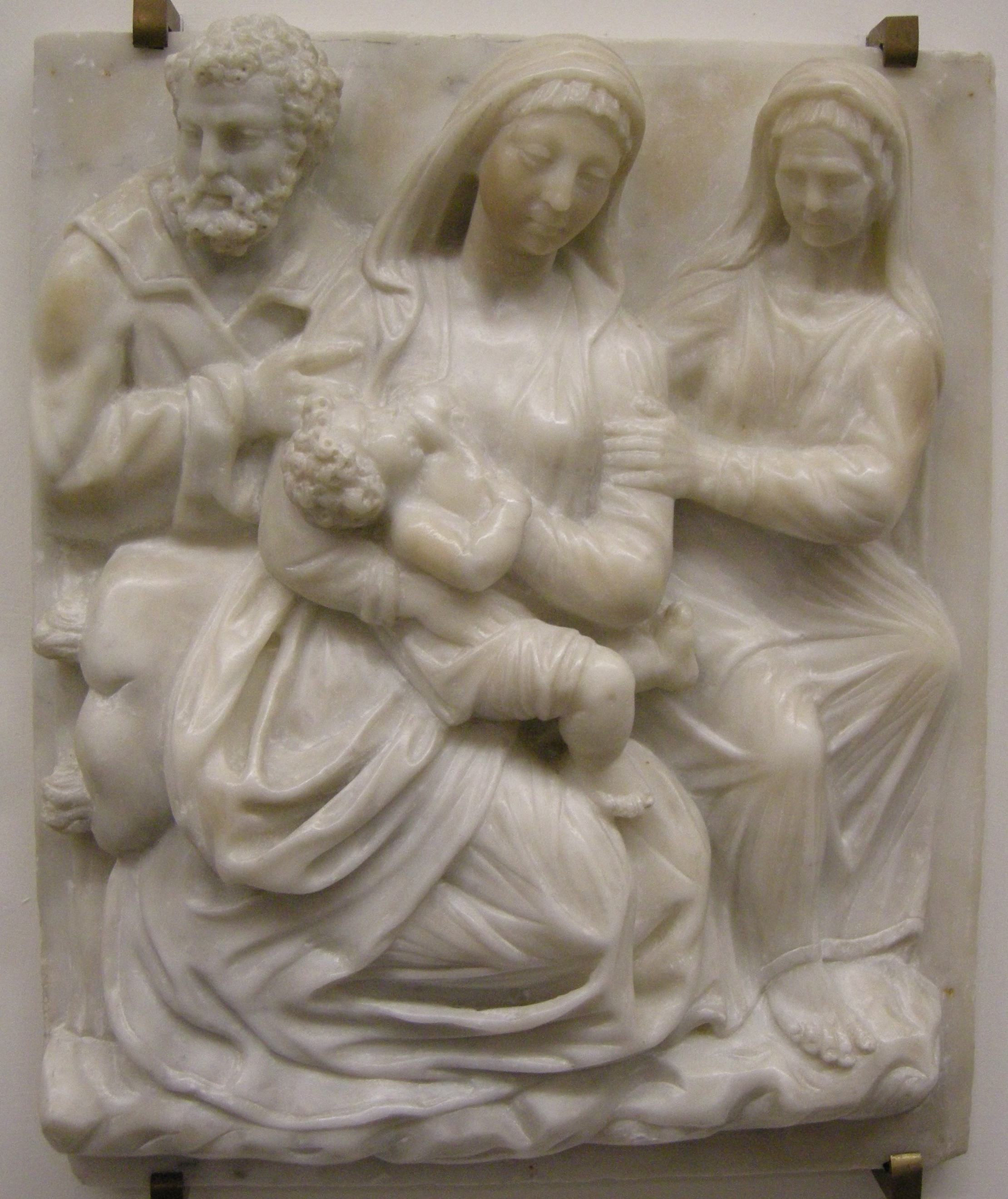 Seguace di francesco da sangallo, sacra famiglia con sant'anna, 1570-1600